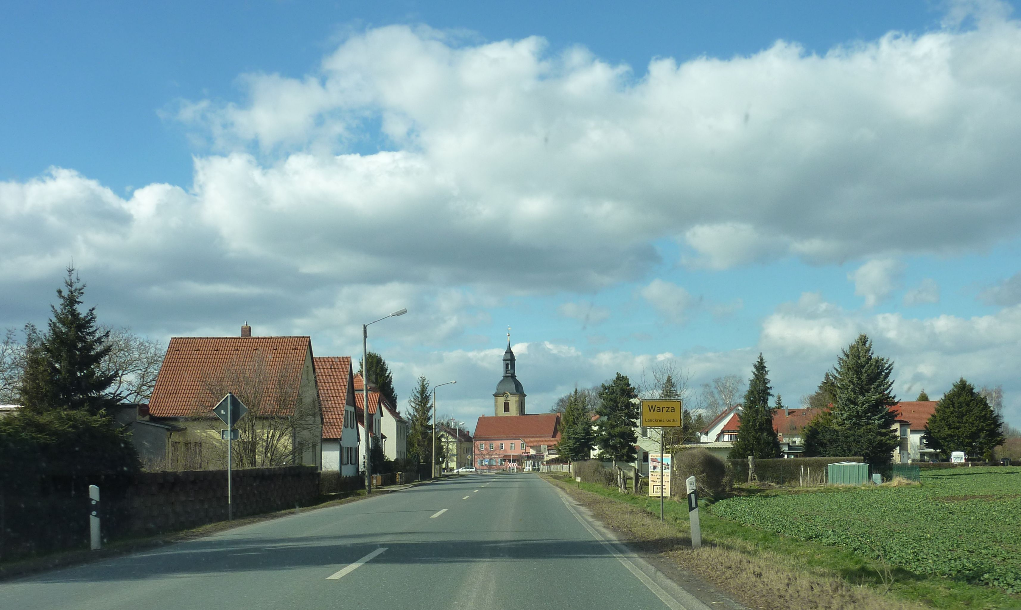 Warza